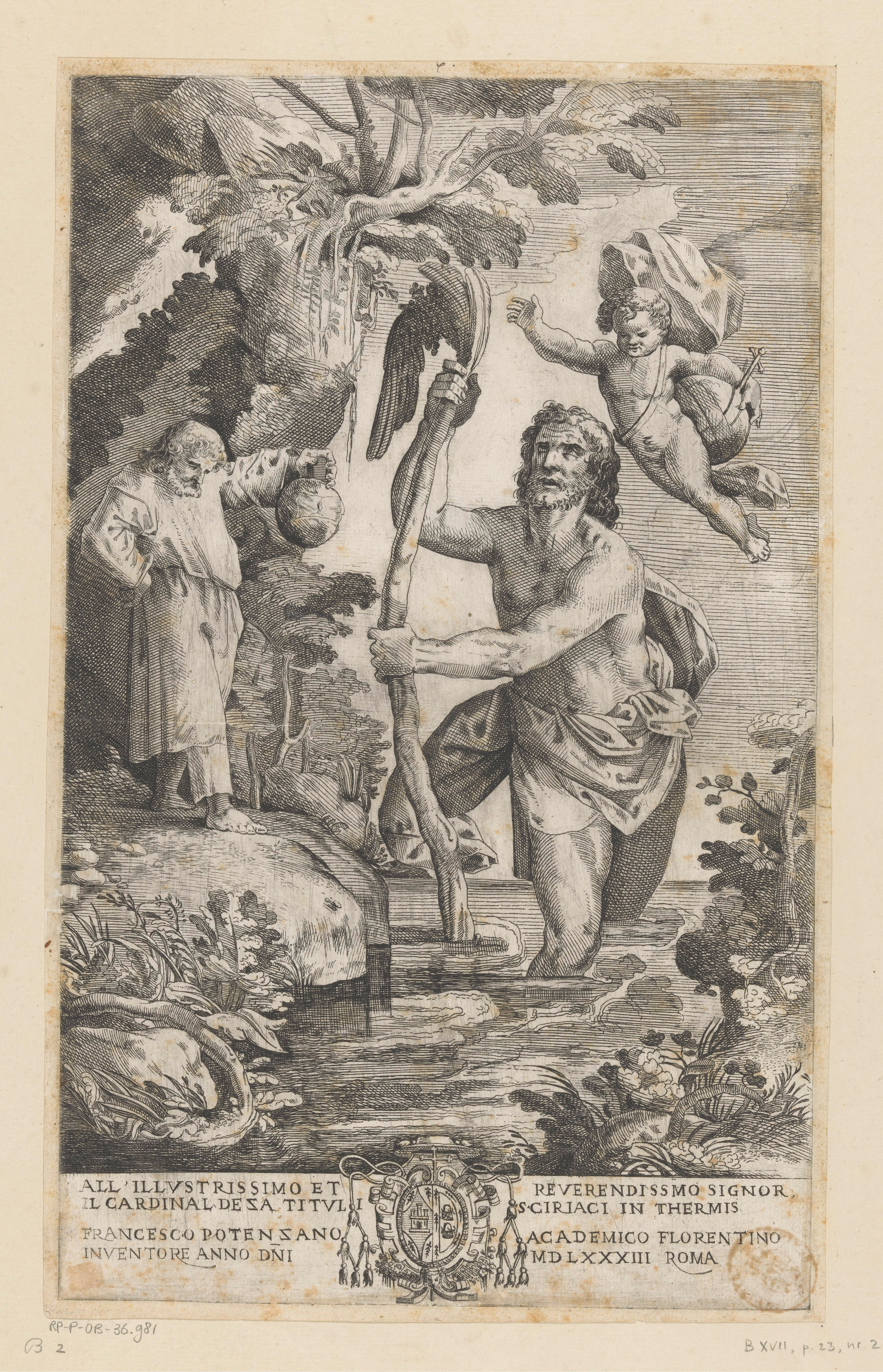 IdentificatieTitel(s): De heilige ChristoffelObjecttype: prent Objectnummer: RP-P-OB-36.981Catalogusreferentie: The Illustrated Bartsch 2Bartsch 2Opschriften / Merken: verzamelaarsmerk, verso, gestempeld: Lugt 240Omschrijving: De heilige Christoffel loopt door het water met zijn staf. Boven hem zweeft het Christuskind met een globe. Op de waterkant links een oude man. Opdracht en wapenschild in ondermarge.VervaardigingVervaardiger: prentmaker: Francesco Potenzanonaar eigen ontwerp van: Francesco Potenzano (vermeld op object)opgedragen aan: onbekend (vermeld op object)Plaats vervaardiging: RomeDatering: 1583Fysieke kenmerken: etsMateriaal: papier Techniek: etsenAfmetingen: blad: h 380 mm (Binnen plaatrand afgesneden.) × b 233 mm (Binnen plaatrand afgesneden.)OnderwerpWat: the giant and martyr Christophorus; possible attributes: palm-tree (with bunches of dates, or withered), infant ChristSt. Christopher, with the infant Christ on his shoulders, wading through the water and carrying his staff (palm-tree); sometimes a hermit stands on the further bank beside a chapel, a lantern in his handVerwerving en rechtenVerwerving: overdracht van beheer 1816Copyright: Publiek domein